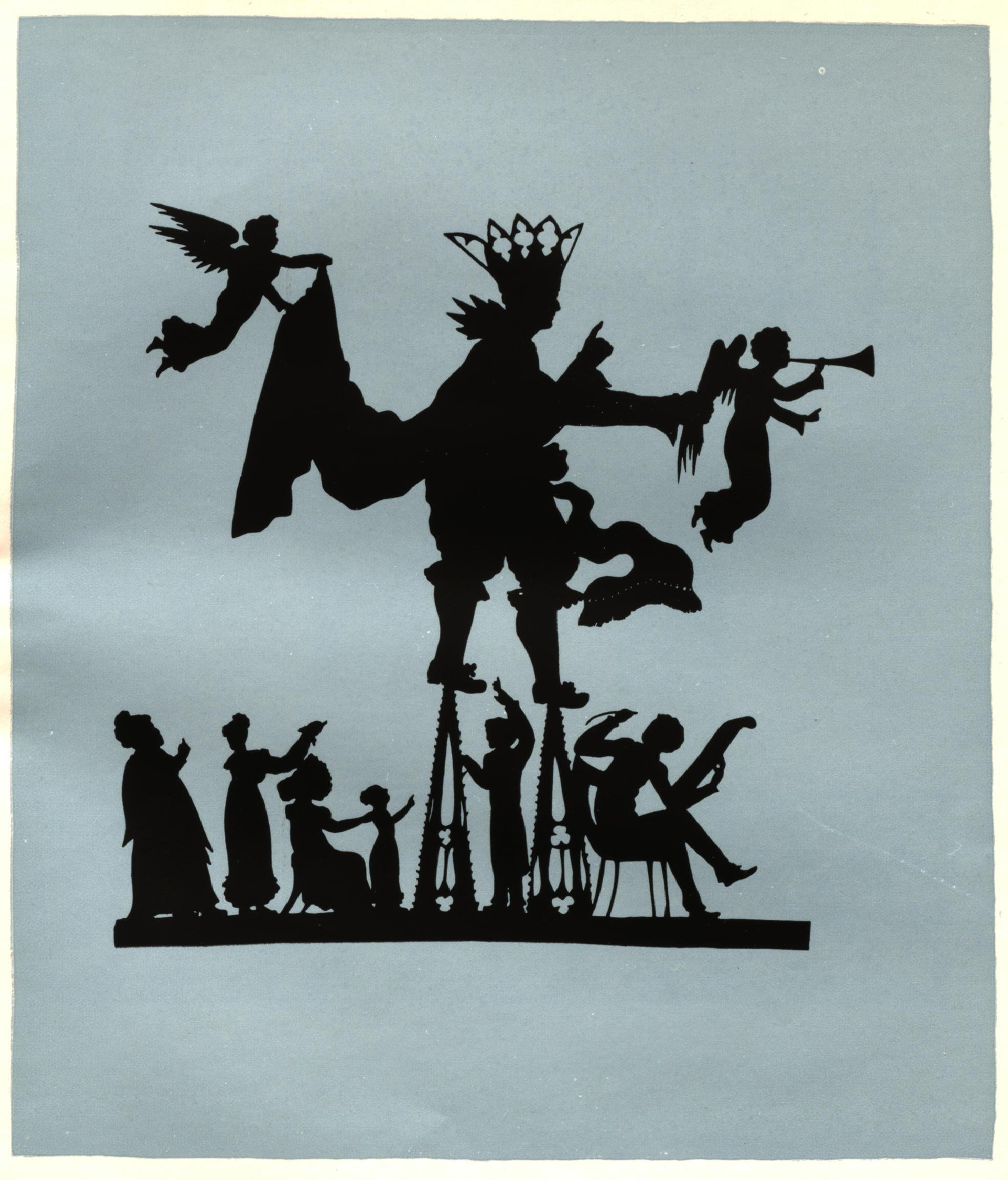 Luise Duttenhofer: Sulpiz Boisserée auf den Spitzen des Kölner Domes, schwarzer Scherenschnitt, blau hinterlegt, nach 1810.